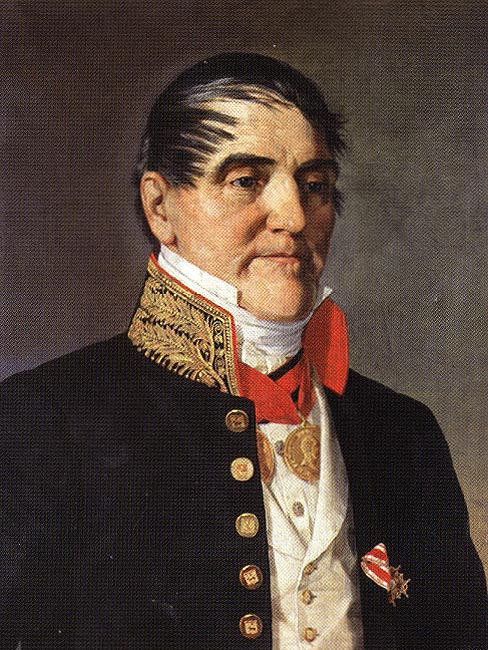 К. И . Корсалин. Никита Фёдорович Мясников